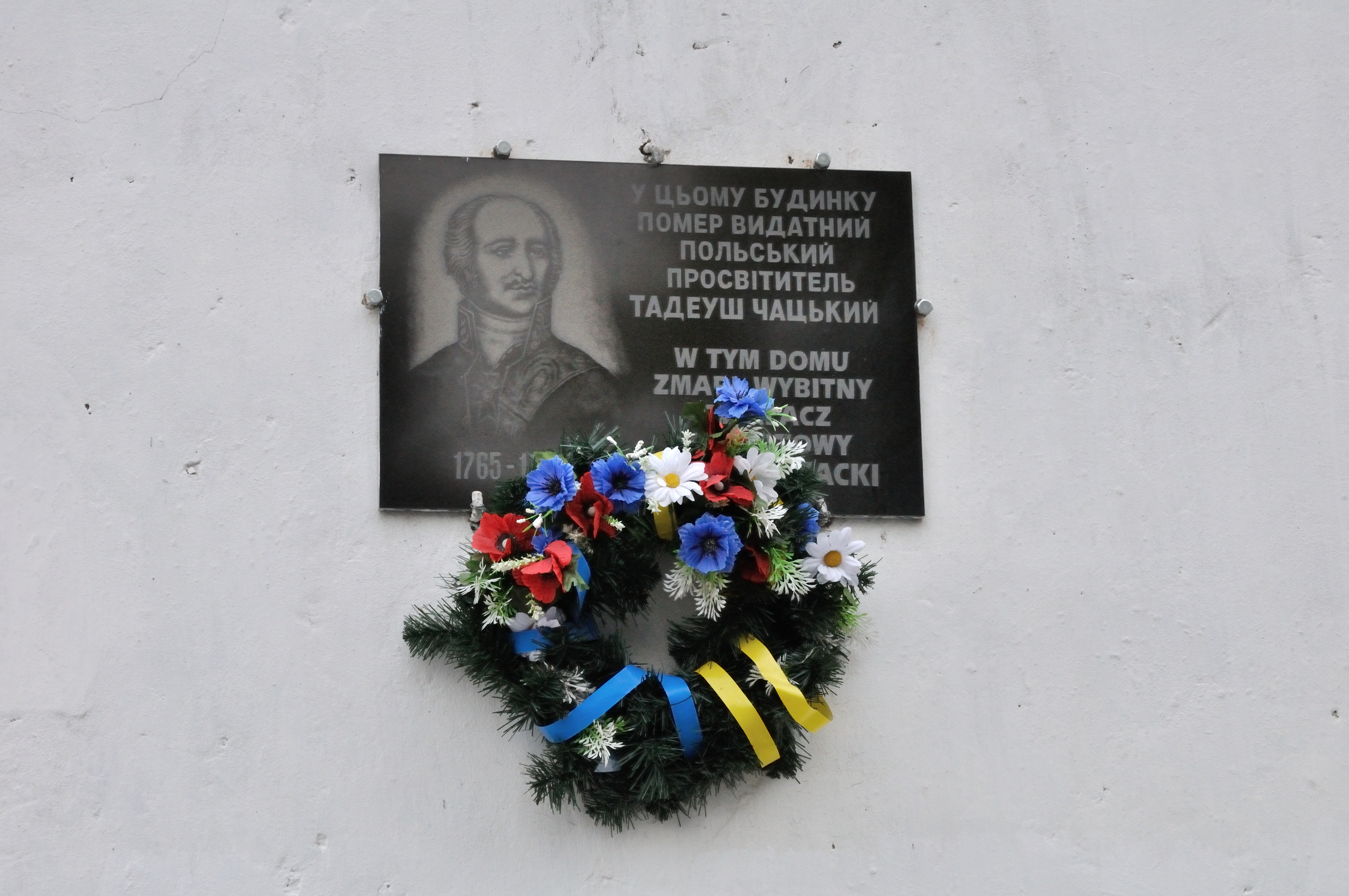 Меморіальна дошка на честь польського вченого та просвітителя Тадеуша Чацького, Дубно, вул. Замкова, 7